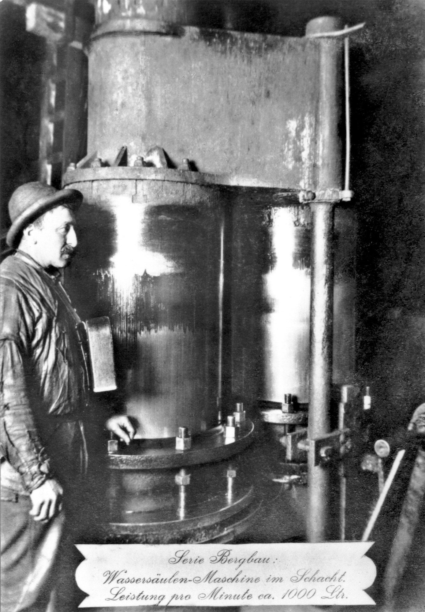 Wassersäulen-Maschine im Schacht